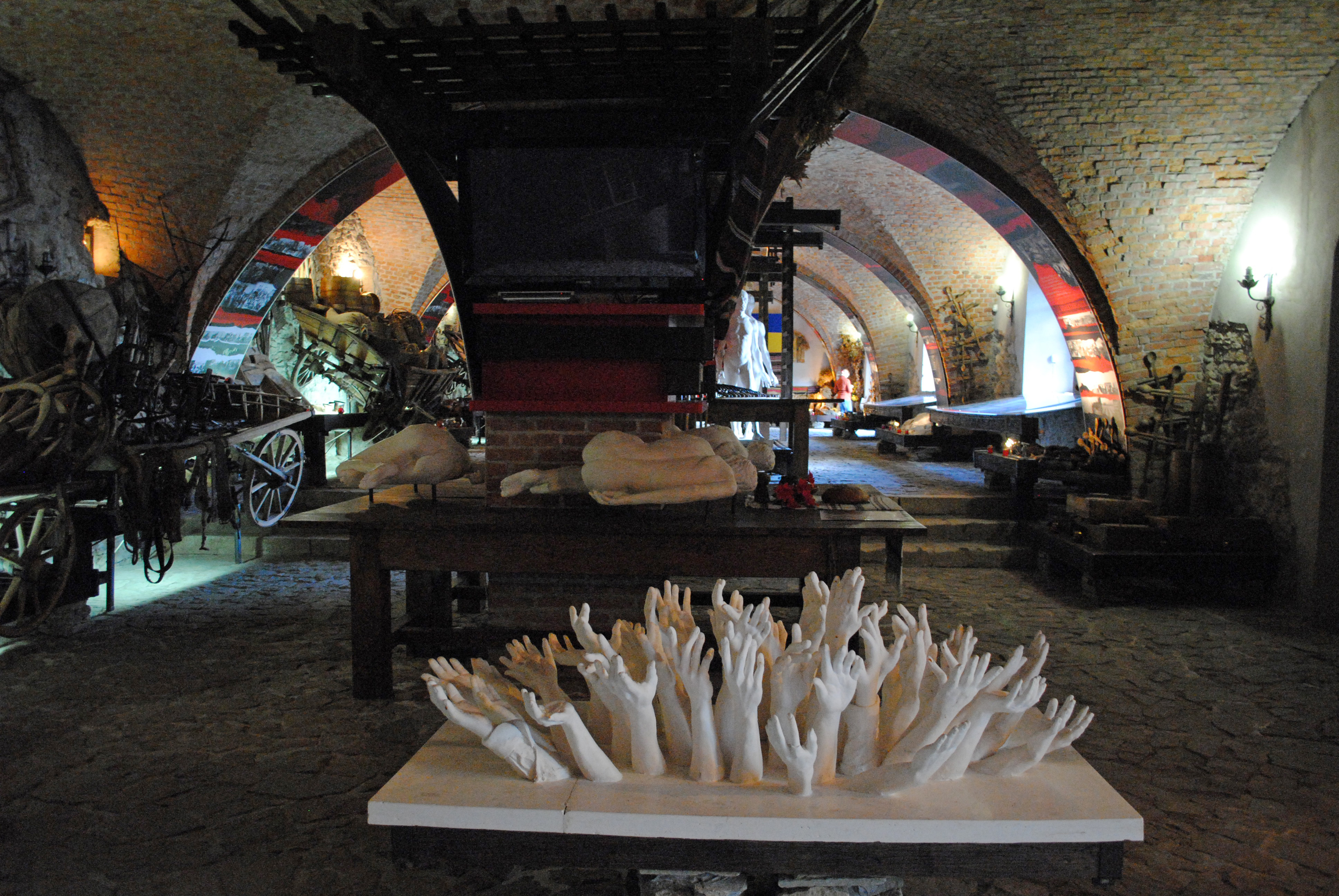 Стайня (мур.), Меджибіж, В приміщенні колишньої стайні нині діє музей пам'яті жертв голодомору.